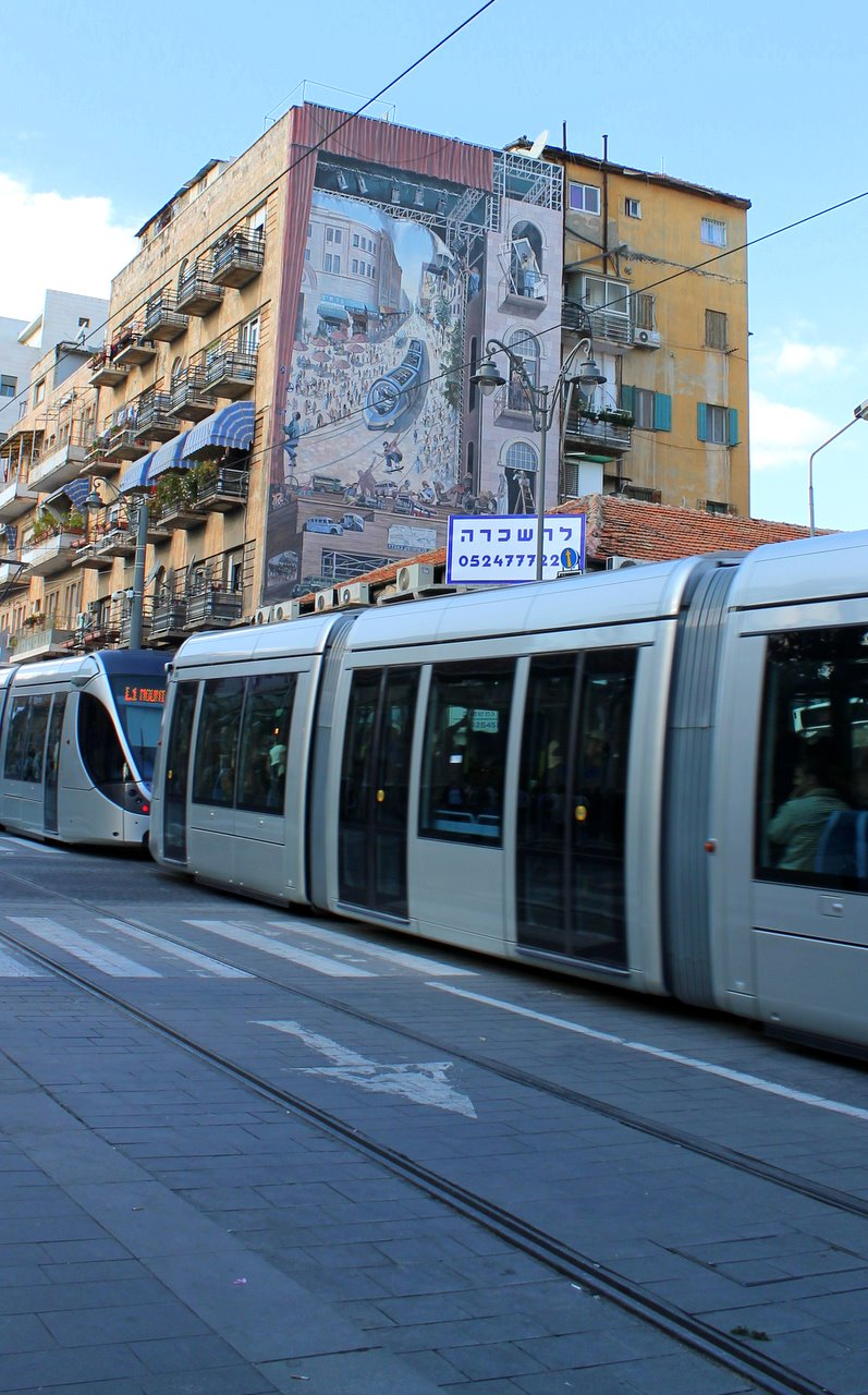 הרכבת!